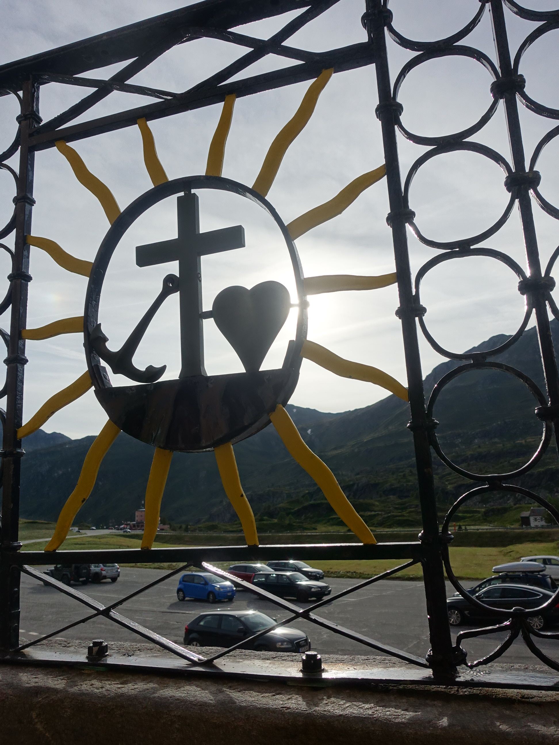 Gitter vor dem Haupteingang des Simplon-Hospizes mit den Symbolen für Glaube, Liebe, Hoffnung nach Hohelied der Liebe (1. Korinther 13)